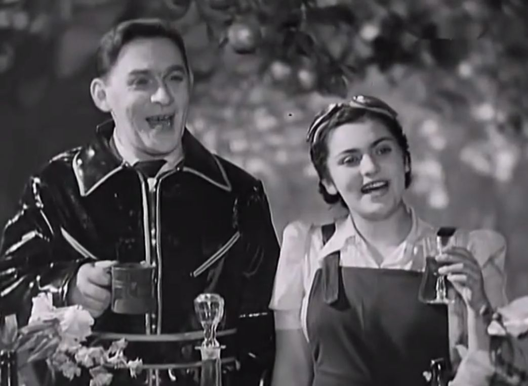 Леонид и Эдит Утёсовы. Исполнение песни "Будьте здоровы, живите богато" (фрагмент фильма "Концерт на экране")